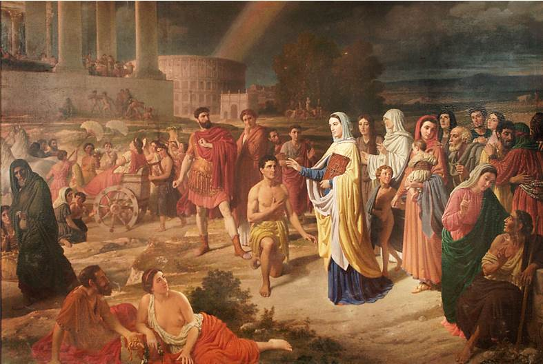 La obra representa la Era Cristiana, que aparece representada por una joven mujer que lleva un libro de los Evangelios en sus manos.